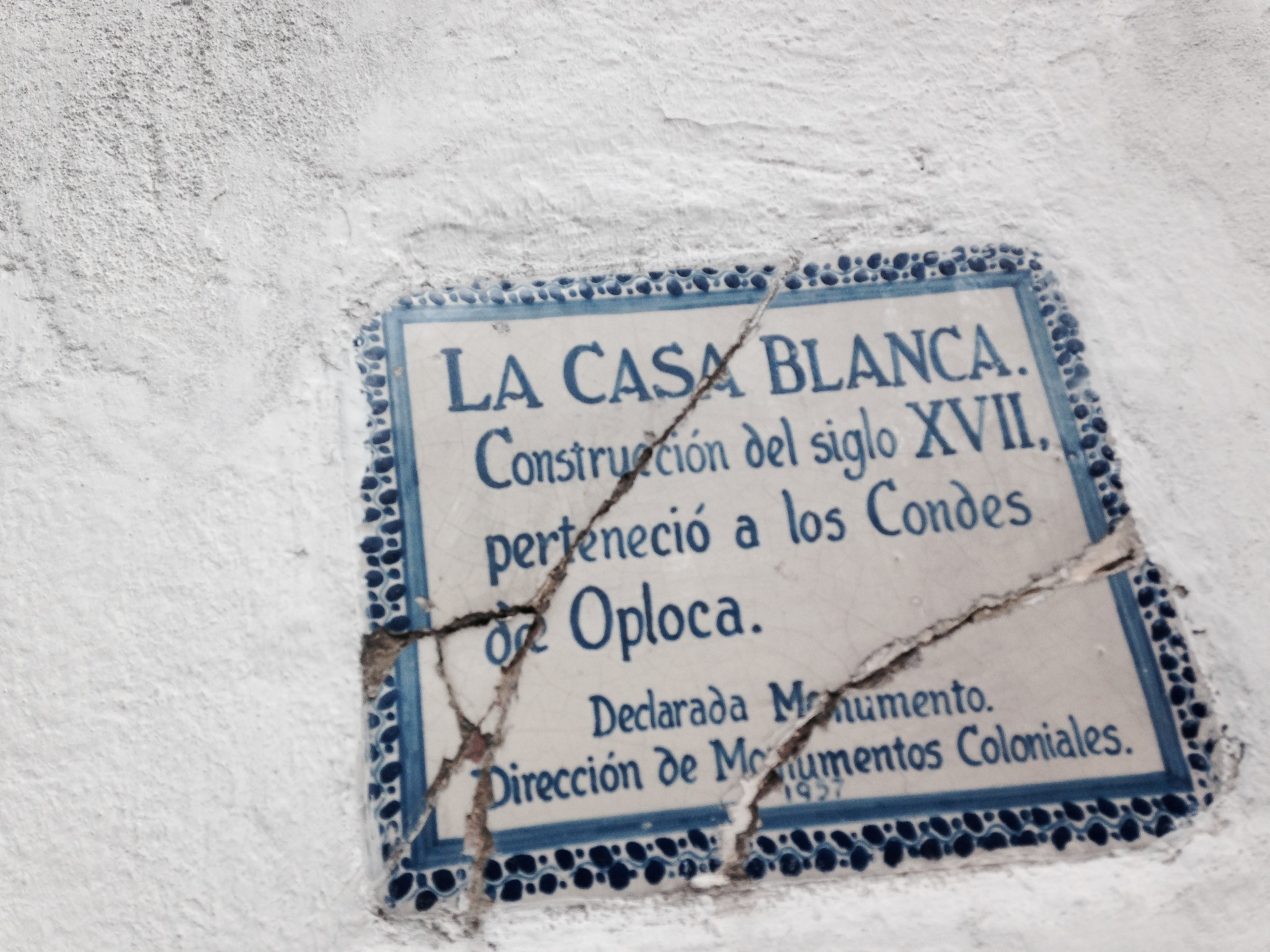 Placa de descripción de la Casa Blanca en San Ángel. Construcción del siglo XVII, perteneció a los condes de Oploca. Declarada monumento por la dirección de monumentos coloniales. Delegación Álvaro Obregón. Distrito Federal México.